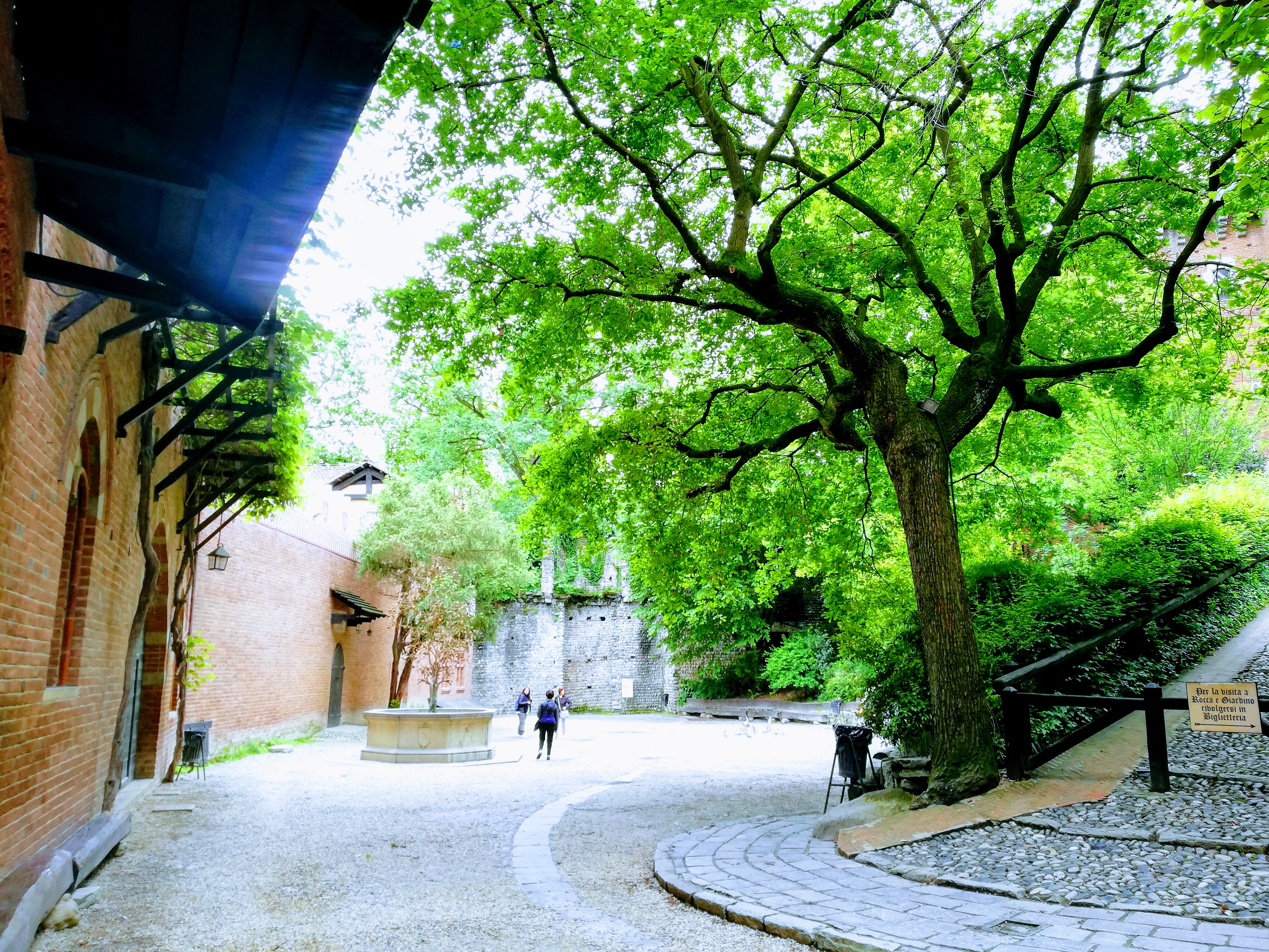 Cortile della Rocca medievale all'interno del Parco del Valentino di Torino